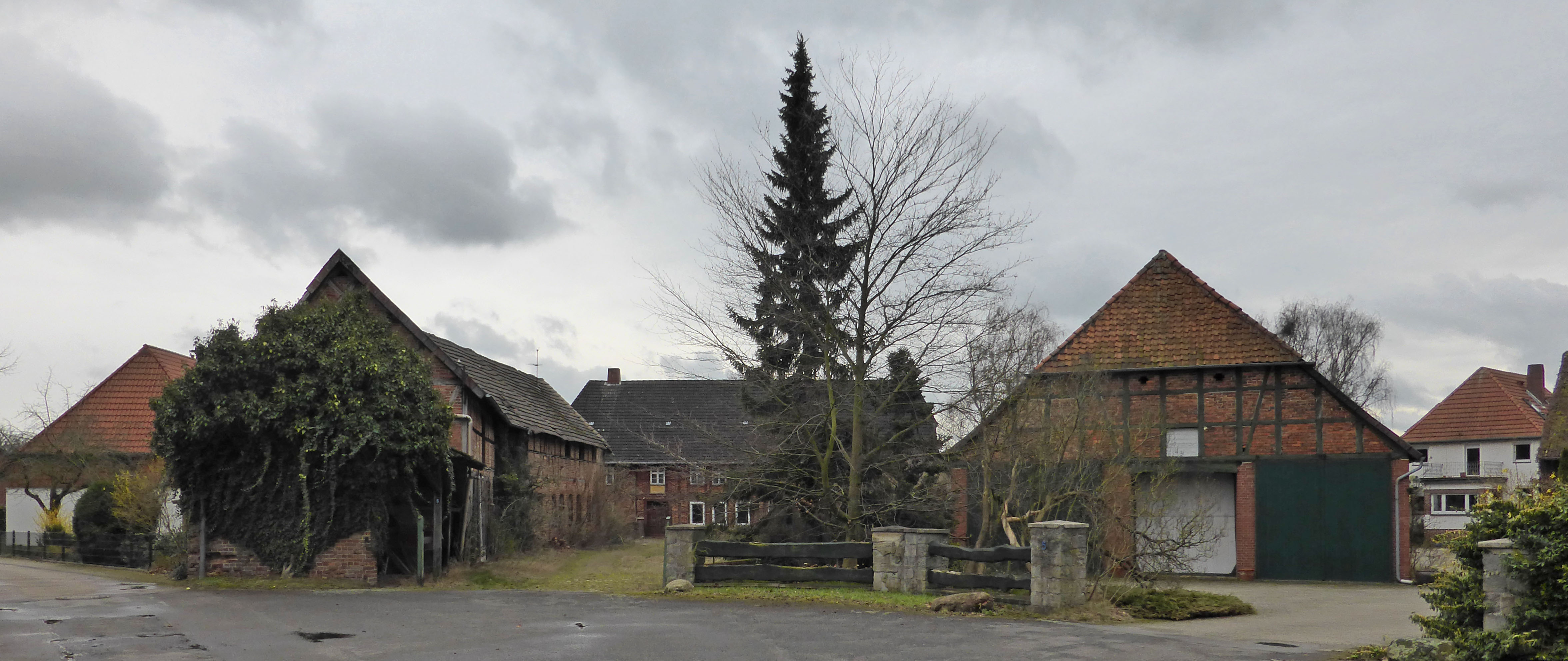 Teilansicht des Rundlings in Warmenau.